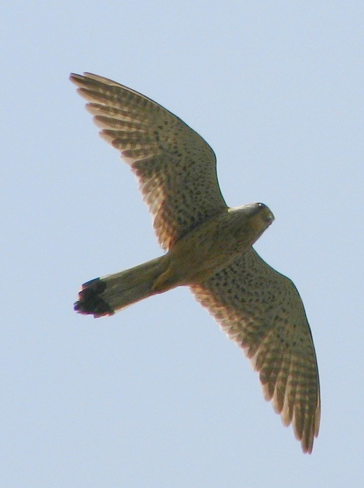 letiaci sokol myšiar,samec